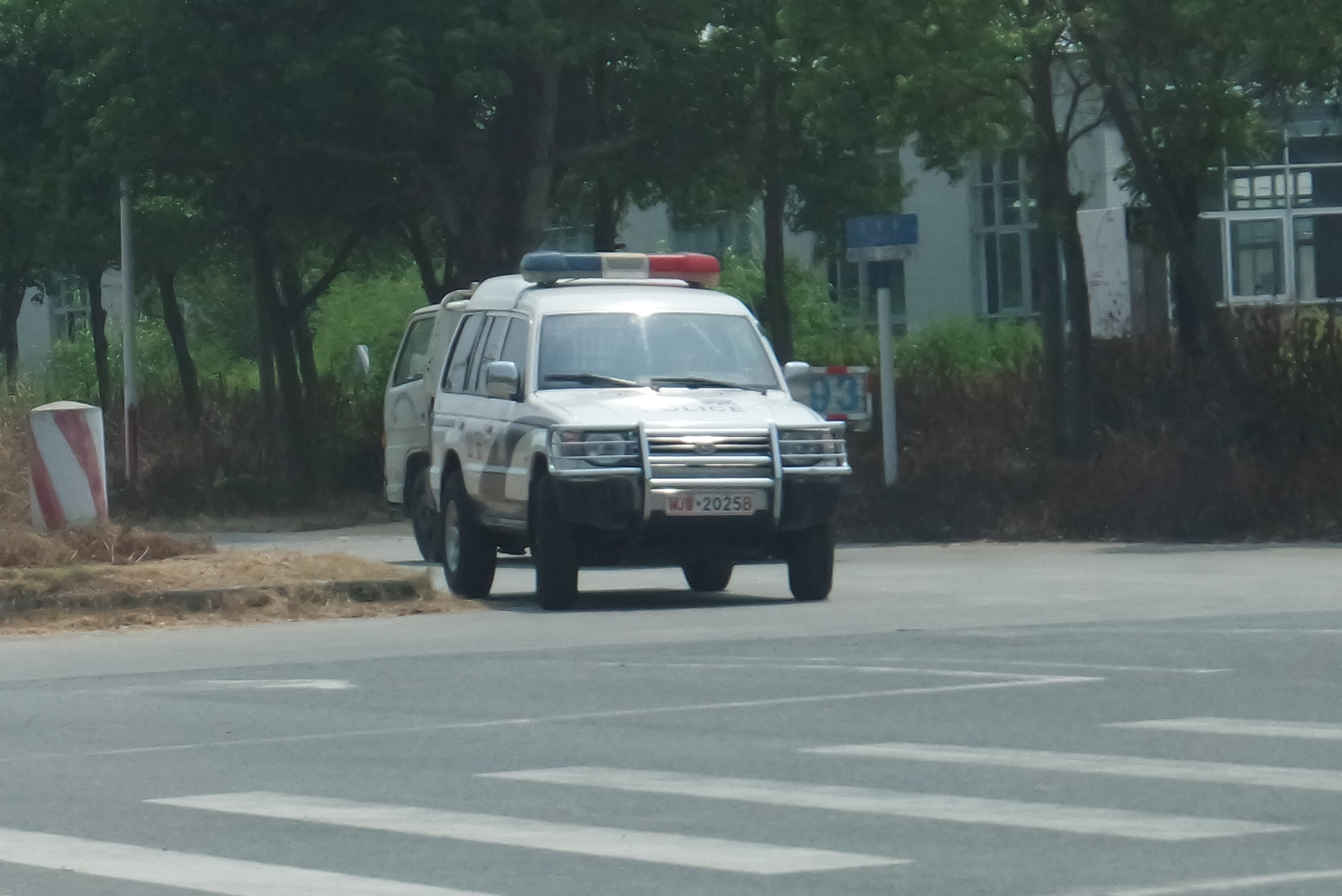 中文（中国大陆）: 拍摄地点：中国广东省中山市 单位：未知武警边防单位 车牌号：WJ粤2025B